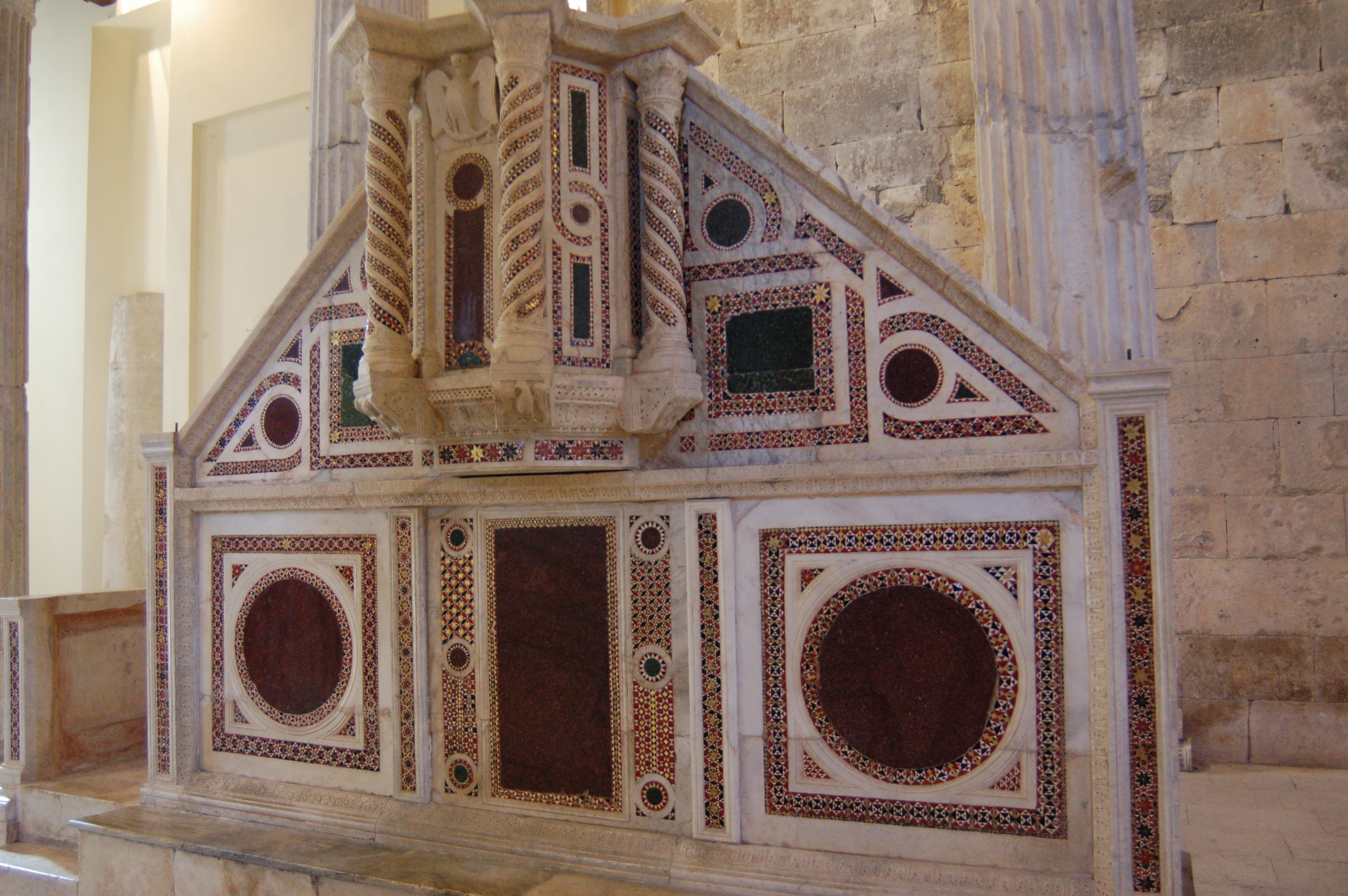 Púlpito cosmatesco de la Iglesia de San Pietro en Alba Fucens, Italia